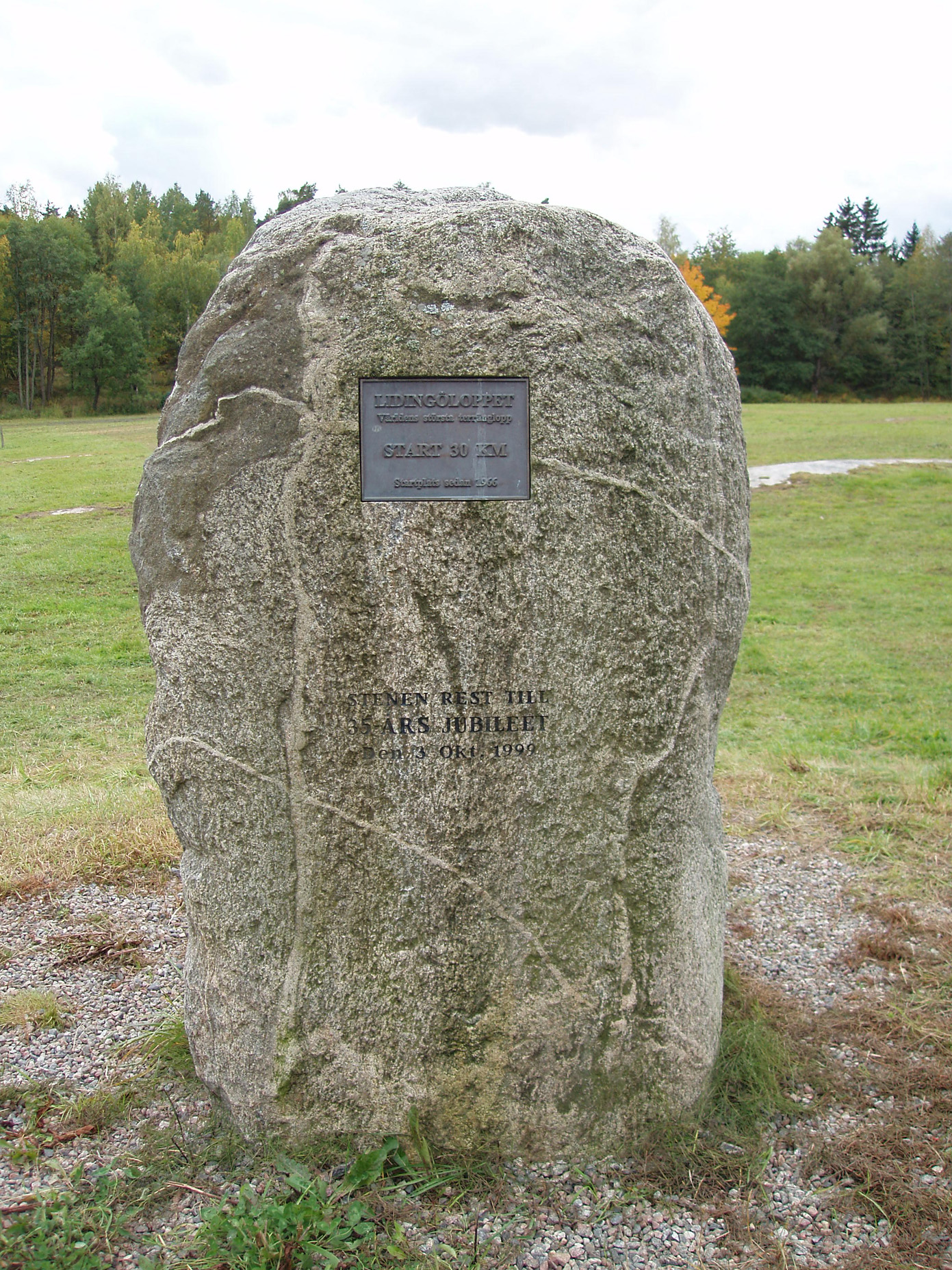 Minnessten rest över tillkomsten av Lidingöloppet 1965 i samband med 35-års jubileet den 3 oktober 1999. Stenen står vid sidan av startområdet för 30 km loppen vid Koltorps gärde.